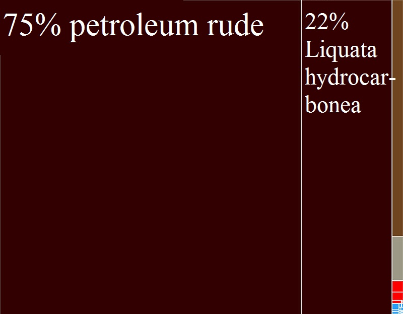 Tabula arborea de exportationibus Guineae Aequinoctialis anni 2009